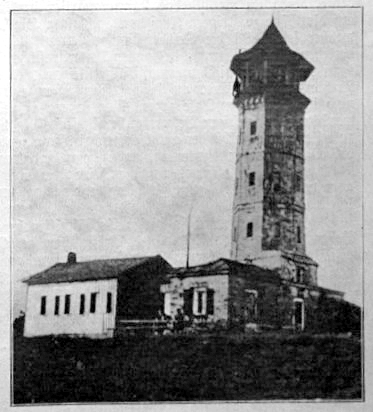 Der Aussichtsturm auf dem Keilberg (Klínovec) mit 1893 angebautem, ersten Unterkunftshaus.